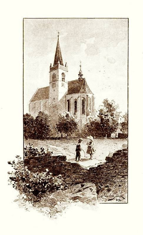 farní kostel v Miličíně (1891) Ottovy vlastivědné edice Čechy, díl VIII.: Táborsko, str. 40, Praha 1892